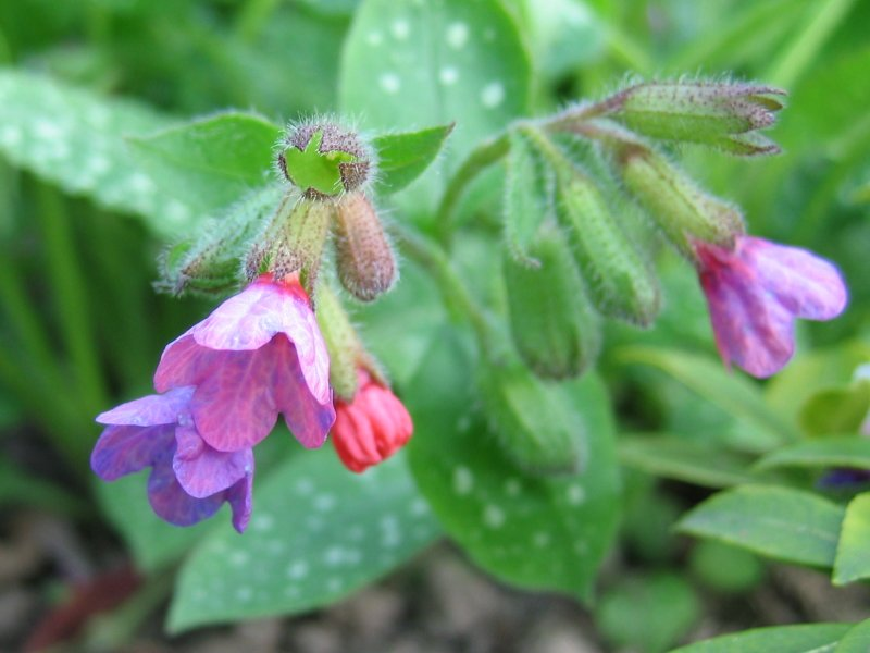 Echtes Lungenkraut Pulmonaria officinalis